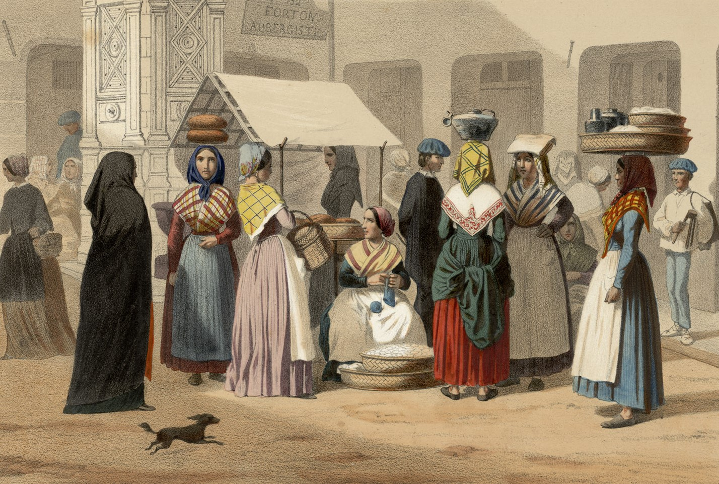 Titre calligraphié et illustré à l'encre sur feuille de calque Fait partie de deux albums réunis et publiés par F. Sinnett à Paris. Lith. de Becquet frères à Paris. Les planches du premier album ont été dessinées par Montaut et lithographiées par Bargue. Les planches du second album ont été dessinées et lithographiées par Charles Maurice. Le titre du premier album est lithographié. Le premier album est signalé dans la bibliographie pyrénéiste de Jacques Labarère comme étant très rare. Pièce jointe : photocopie en n. et b. d'une lithographie de Montaut intitulée "[Col de Tortes - Traversée de la montagne]". Ancely, René (1876 - 1966). Possesseur